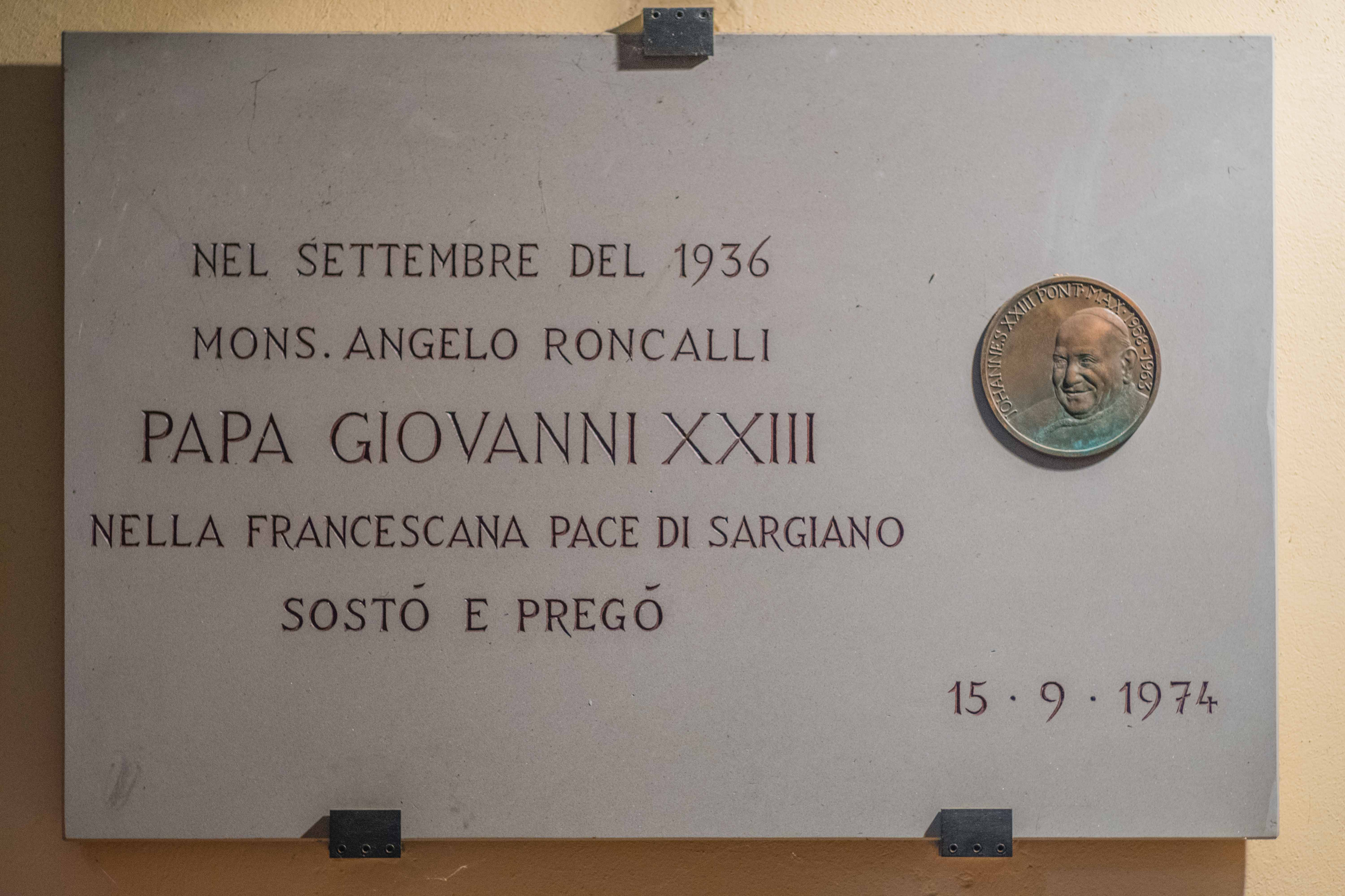 Papa Giovanni XXIII Marmo Commemorativo presso Sargiano